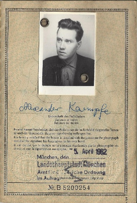 Passausschnitt mit Foto Alexander Kaempfes